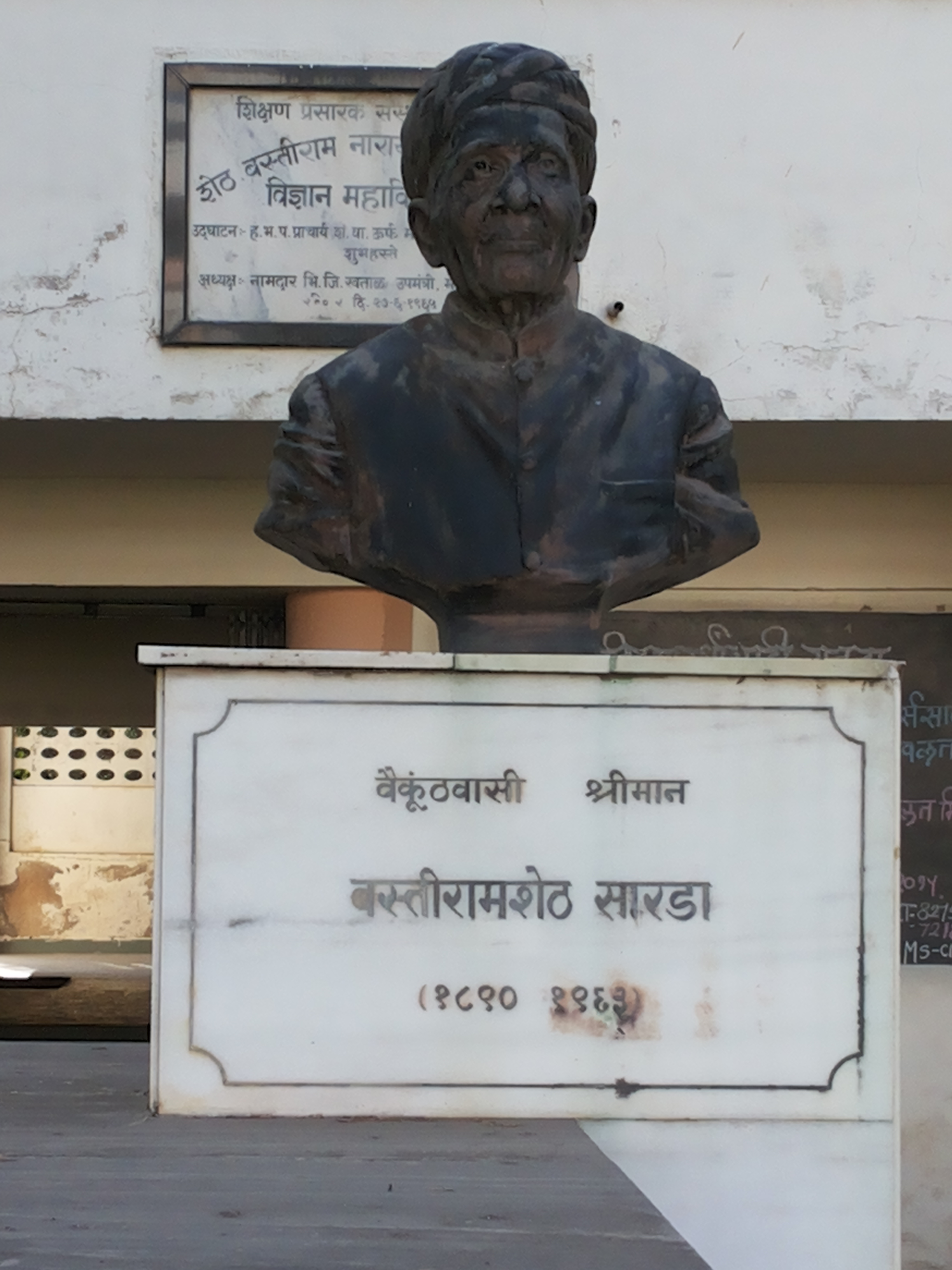 श्रीमान बस्तीरामशेठ नारायणदास सारडा यांचा विज्ञान इमारतीसमोर उभारण्यात आलेला अर्धपुतळा